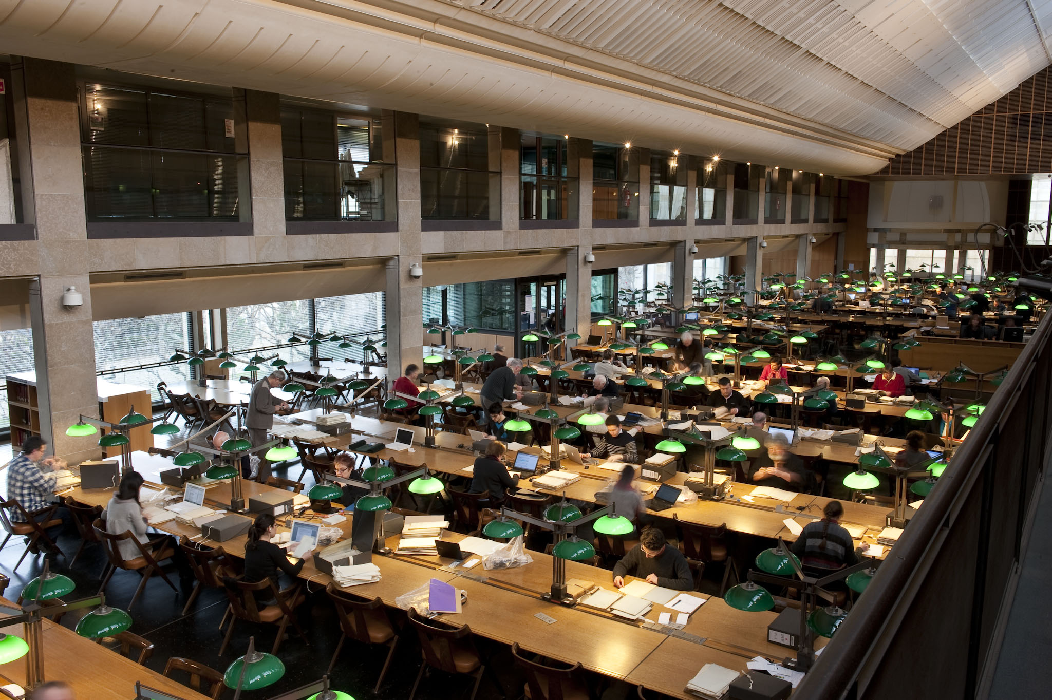 Salle de lecture du centre d'accueil et de recherche des Archives nationales (Caran). Architecte Stanislas Fiszer. Paris, rue des Quatre fils.